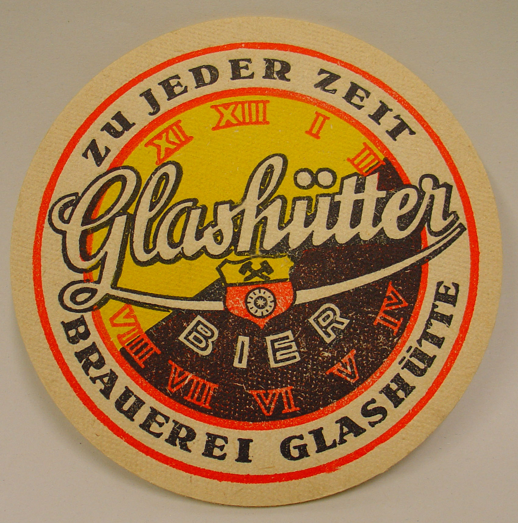 Bierdeckel der Müglitztalbrauerei Glashütte